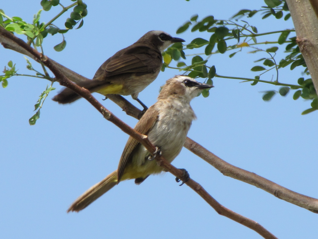 yellow-vented bulbul